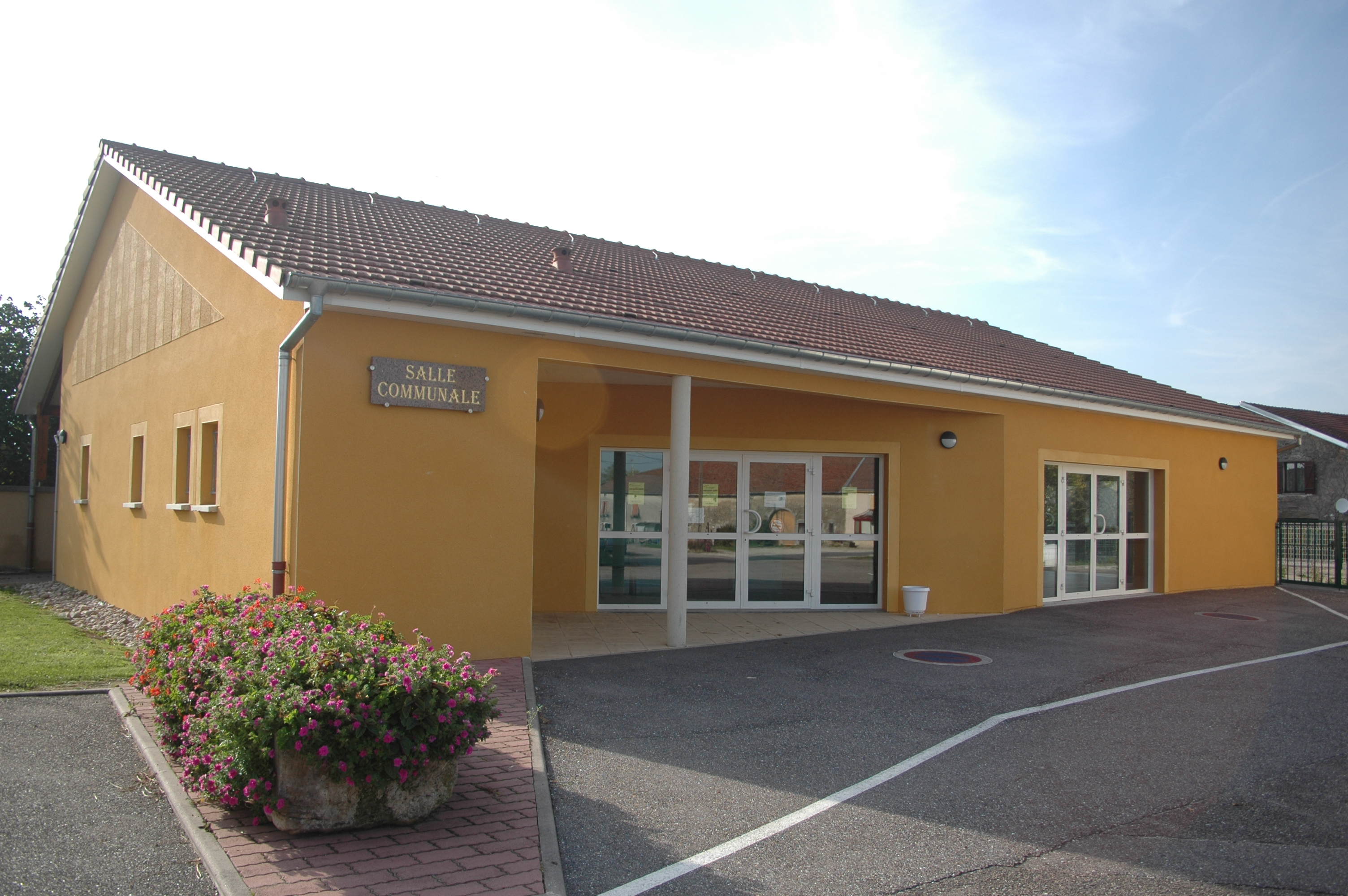 Salle polyvalente